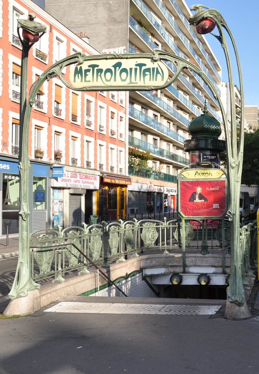 Edicule Guimard, station "Avron" à Paris. On peut voir une affiche publicitaire de la station de radio RTL avec l'animatrice Flavie Flament